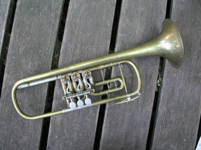 Foto Trompete Monke (Stegmann-Modell)